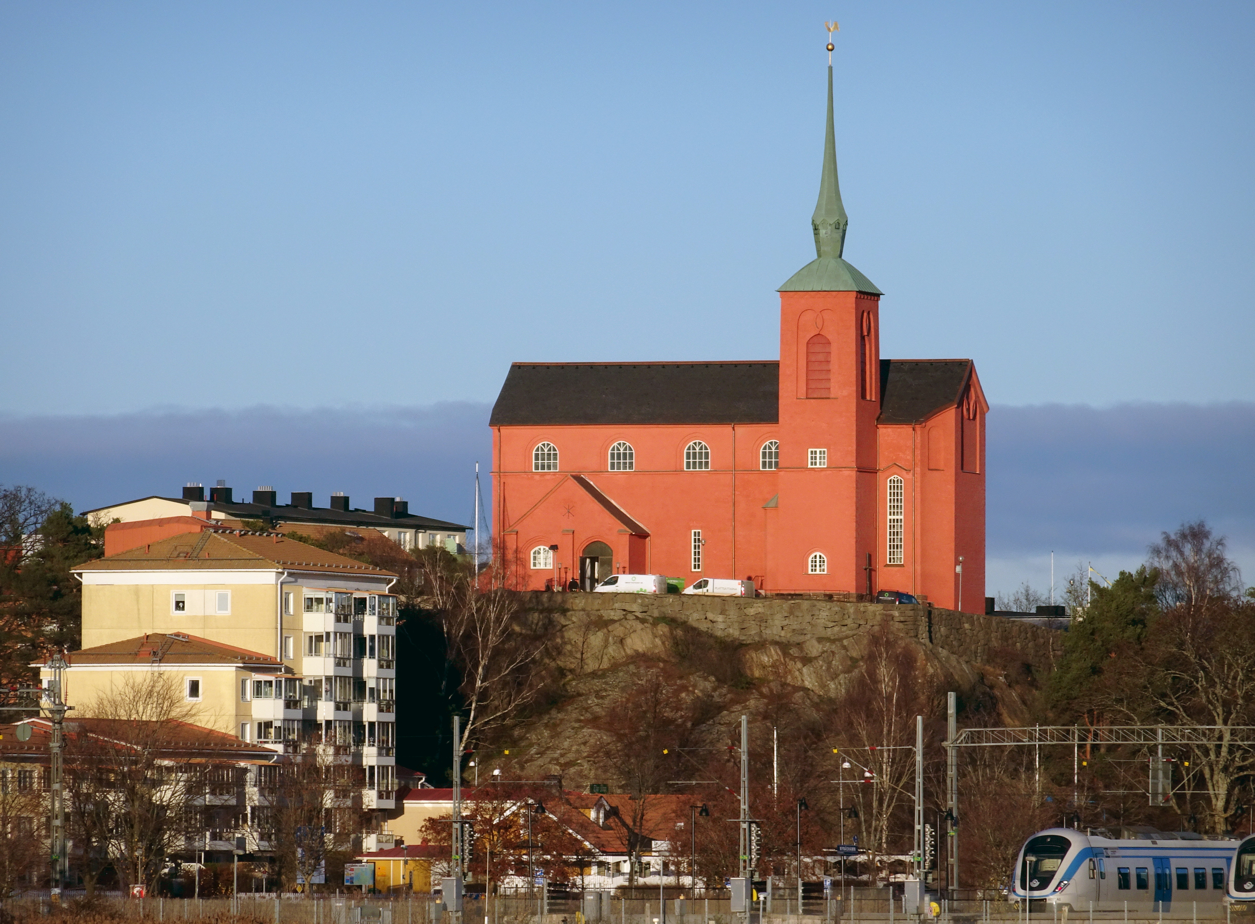 Nynäshamns kyrka